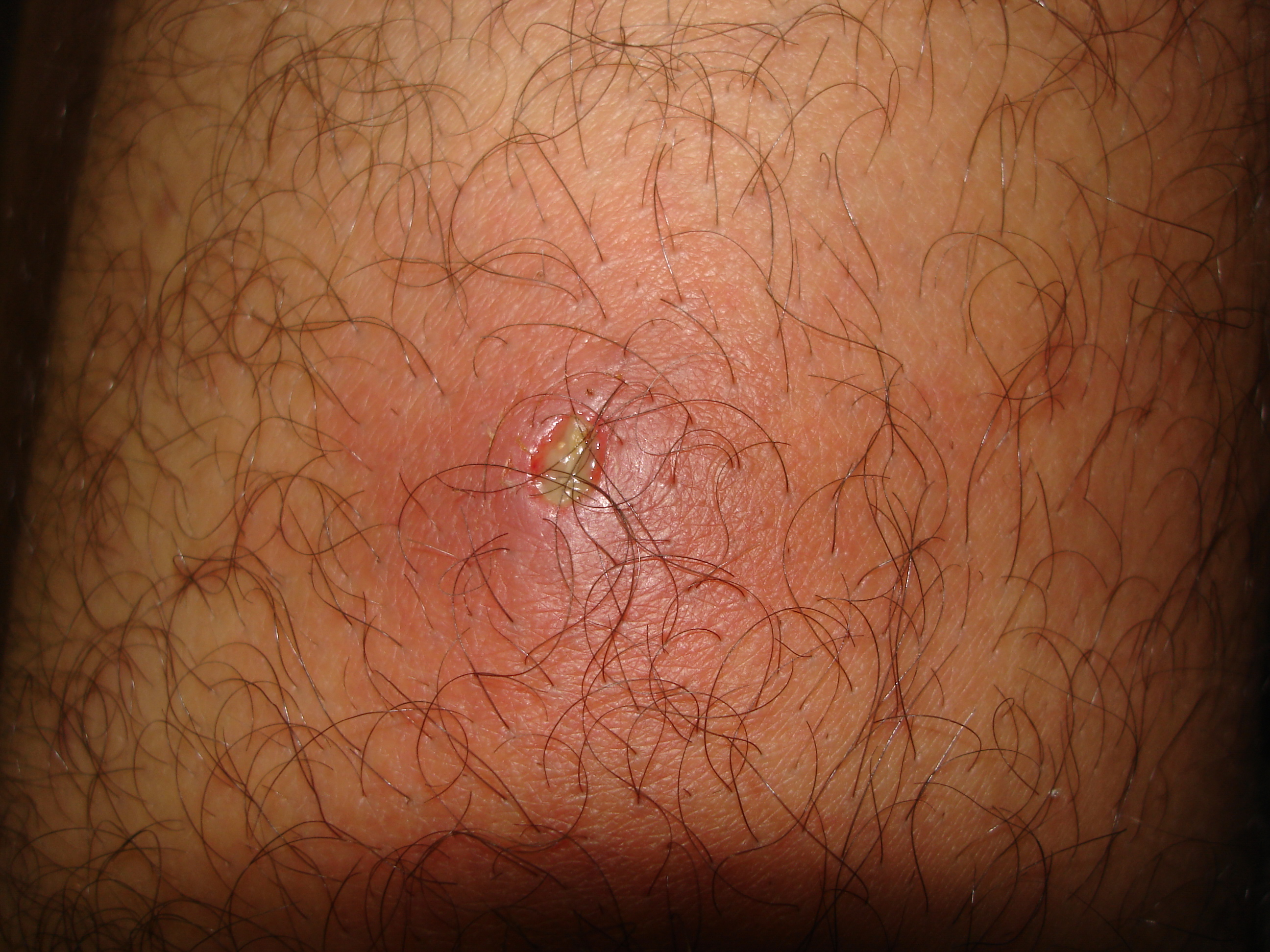 Exemple de furoncle